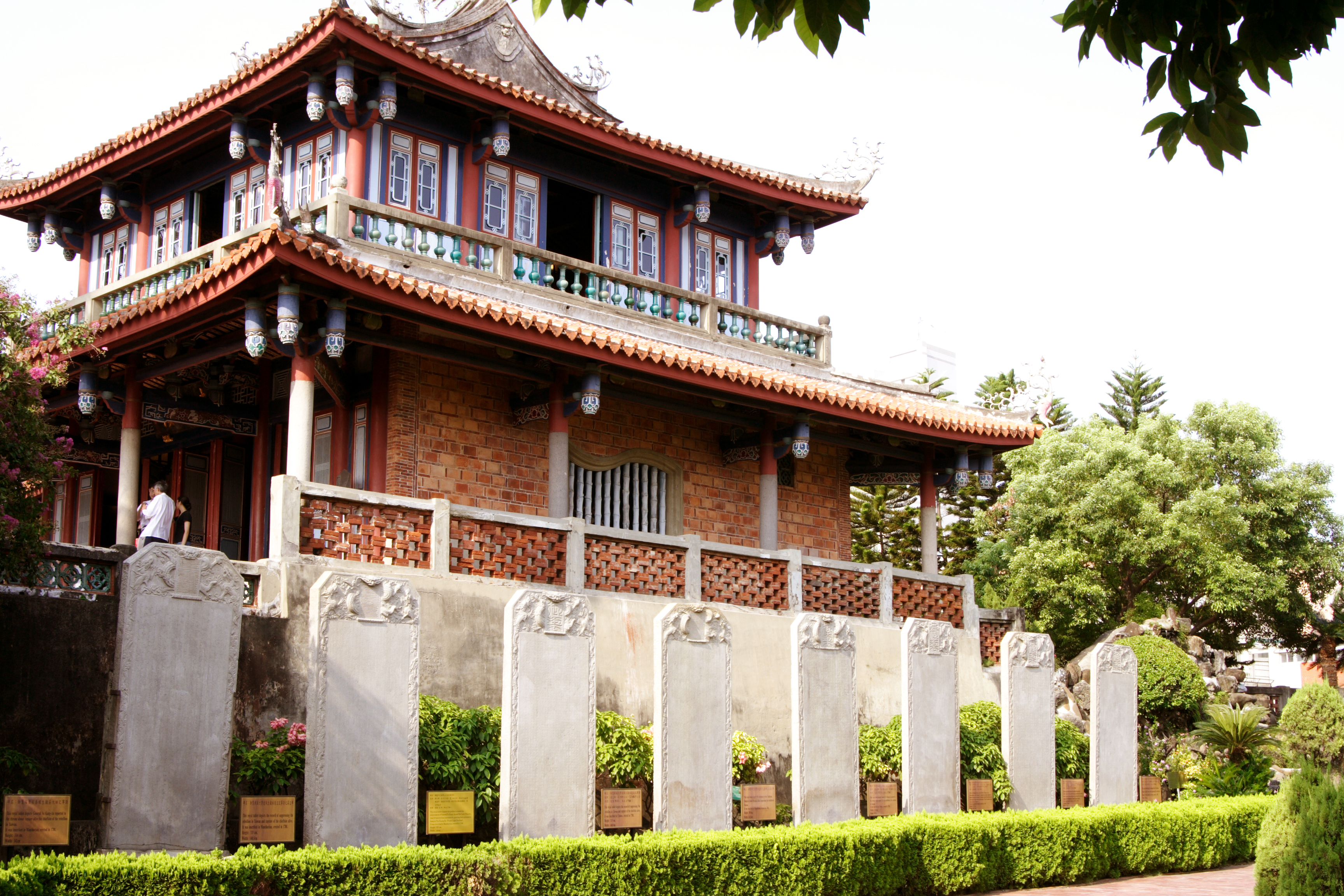 臺灣臺南市的赤崁樓。